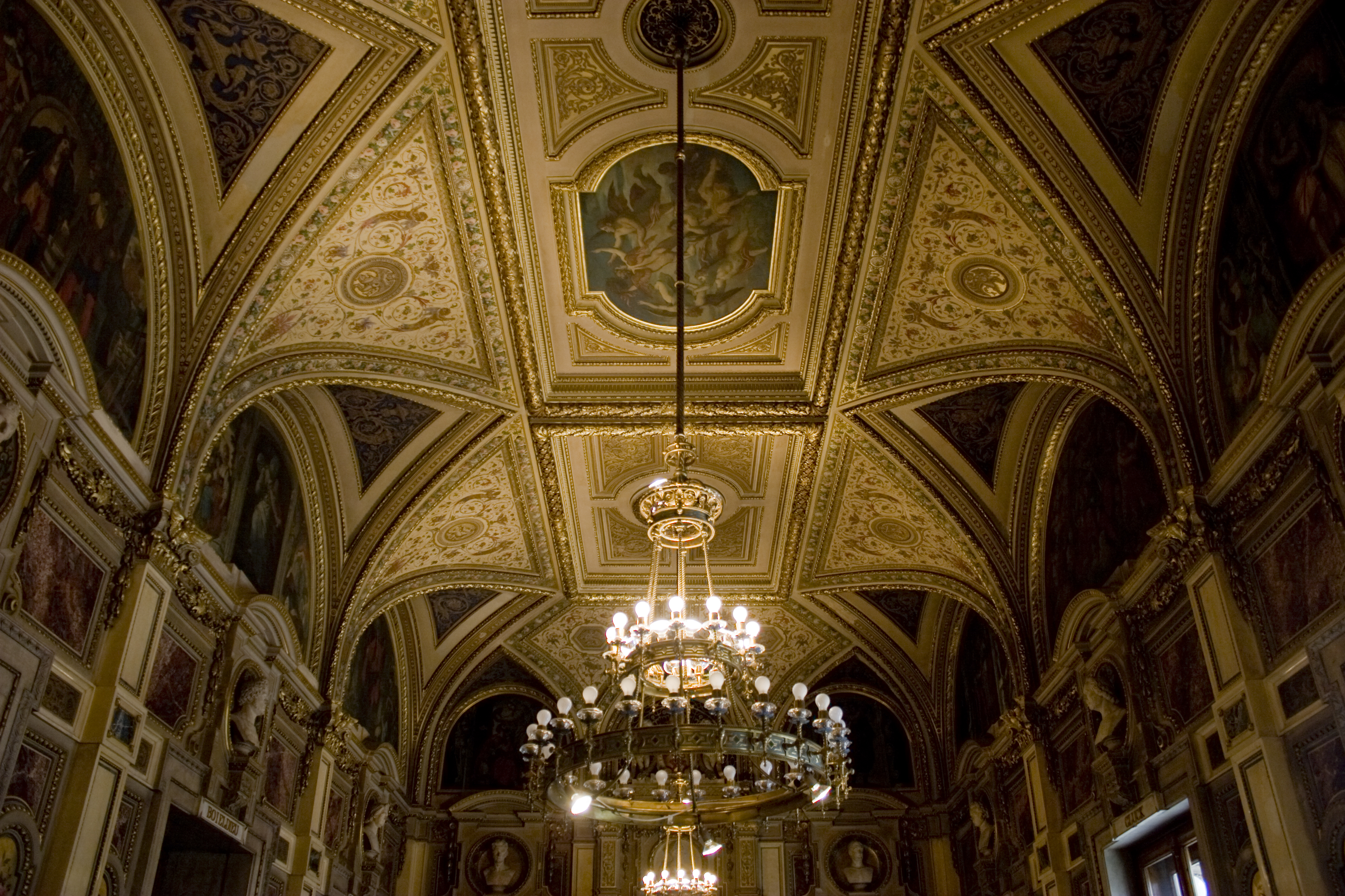 Vienna State Opera - Inside